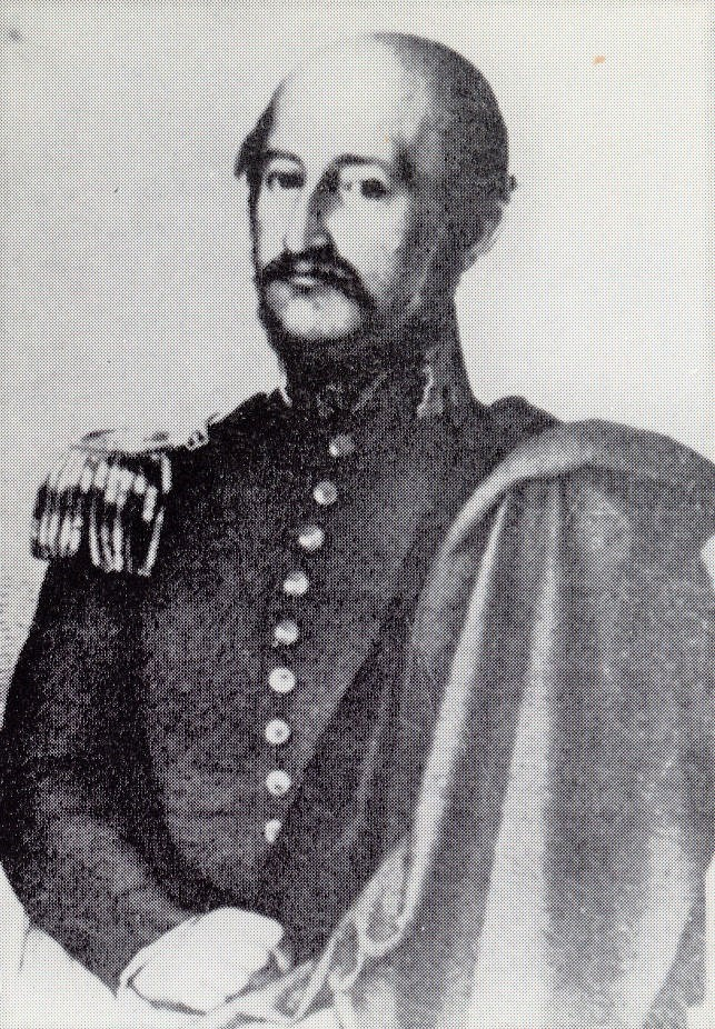 Bernardo ó Bernhard Eunom Philippi Krumwiede nació el 19 de septiembre de 1811 en Charlottenburg, Berlín, Prusia, (posteriormente Alemania). Fue hijo de John Wilhelm Eberhard Philippi y de María Ana Krumwiede.